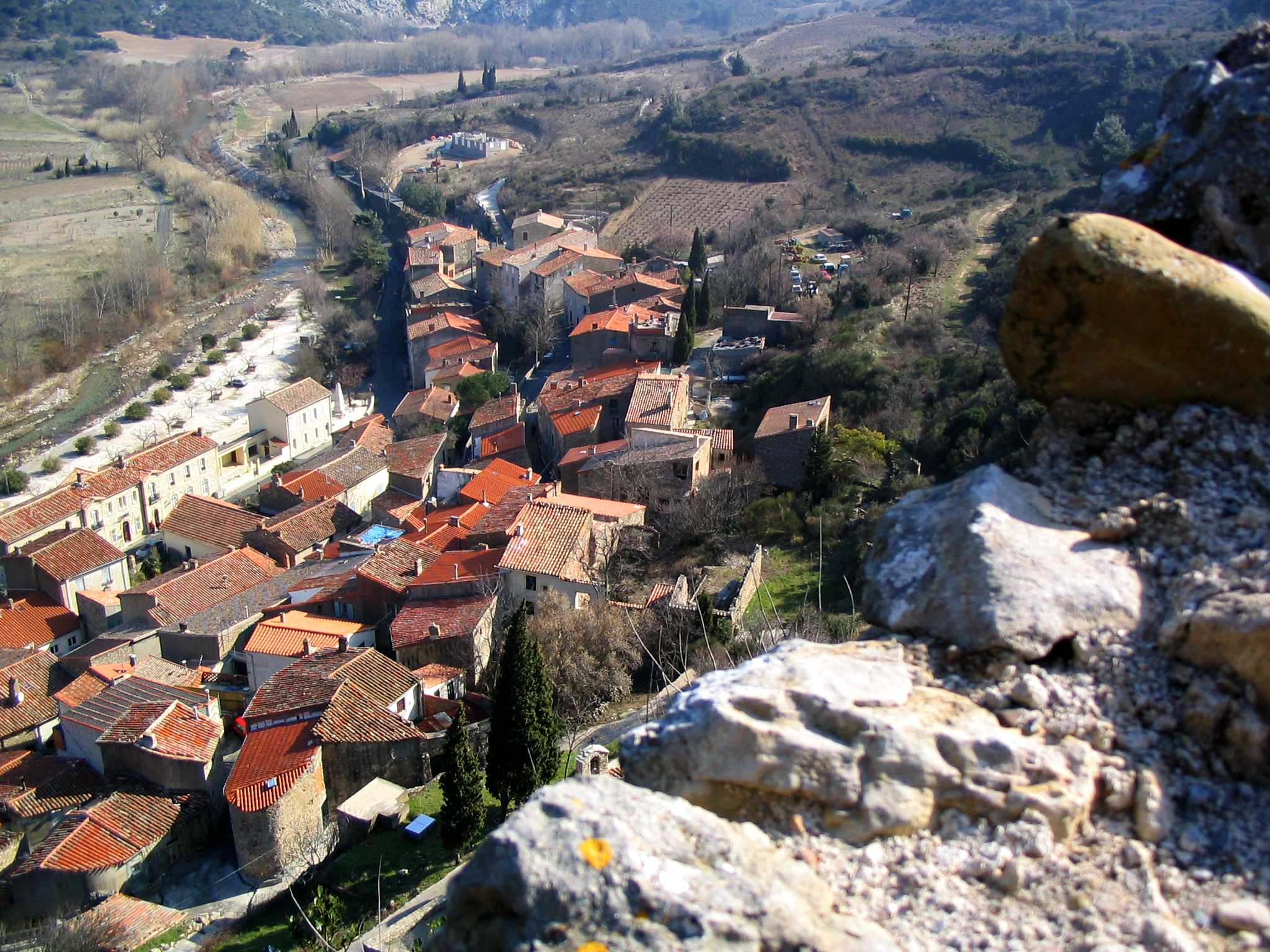 Padern (Aude, 11), vue depuis son château